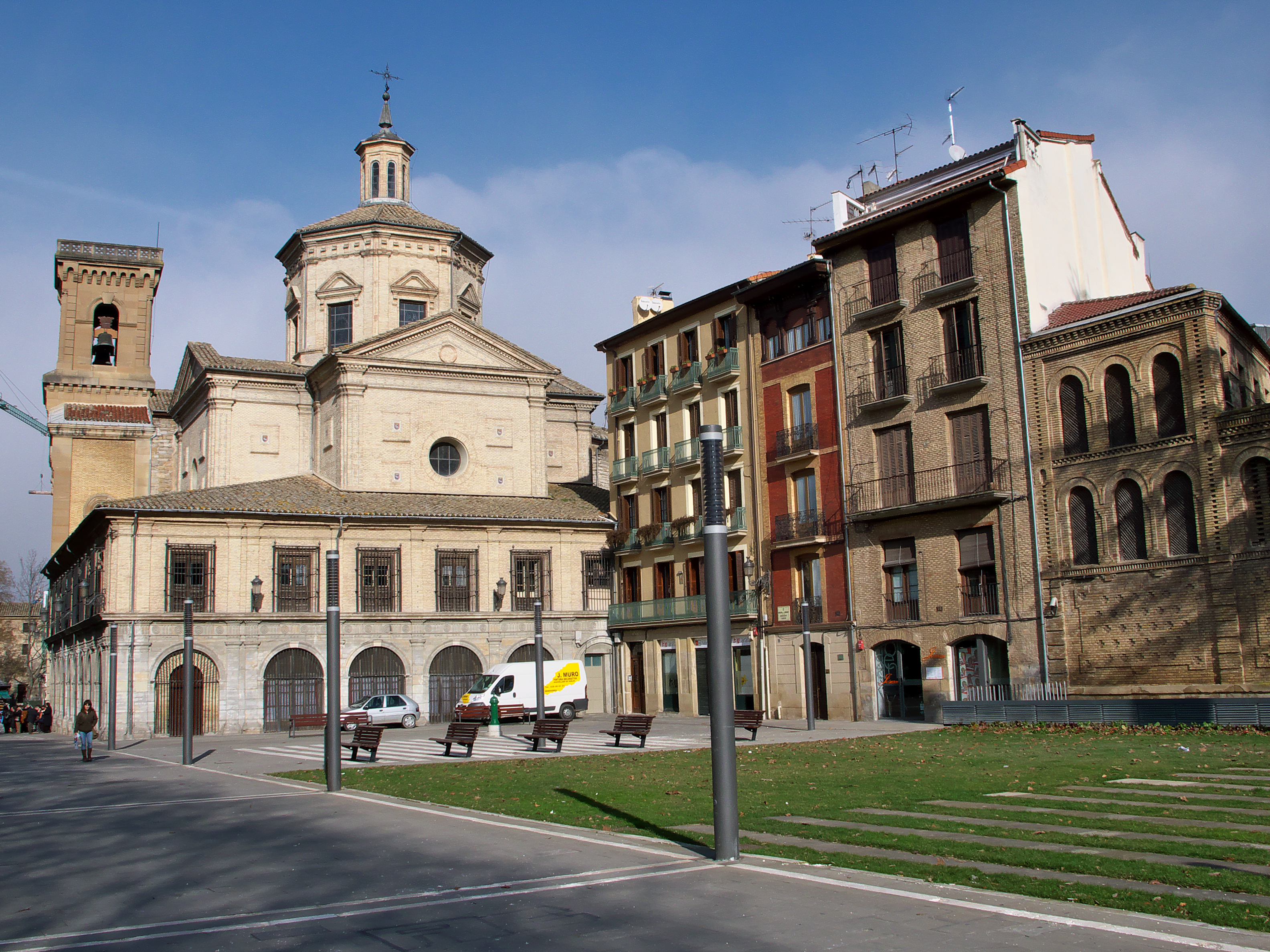 Iglesia de San Lorenzo, reconstruída por Florencio Ansoleaga y Elizondo (ca. 1901).